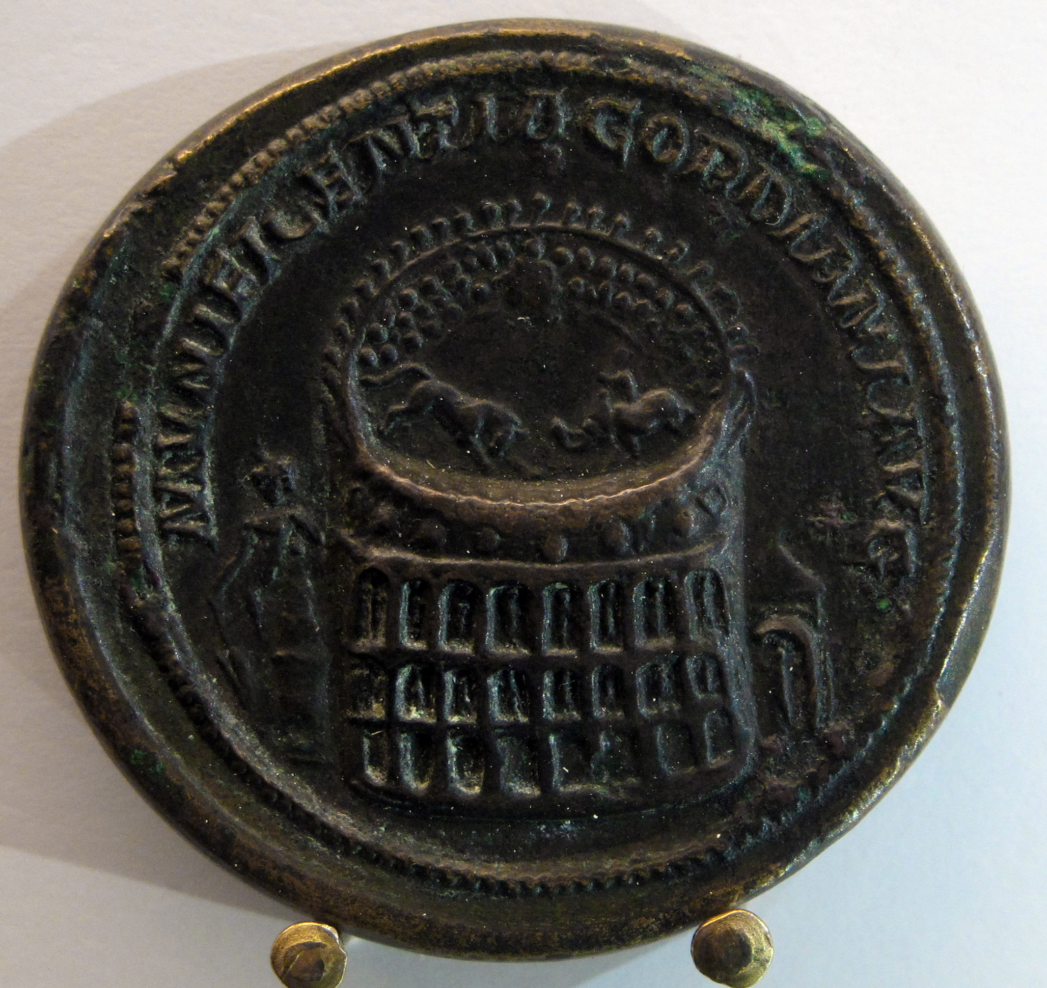 Medaglione di gordiano III, con colosseo durante un combattimento tra un toro e un elefante, tra meta sudans e colosso